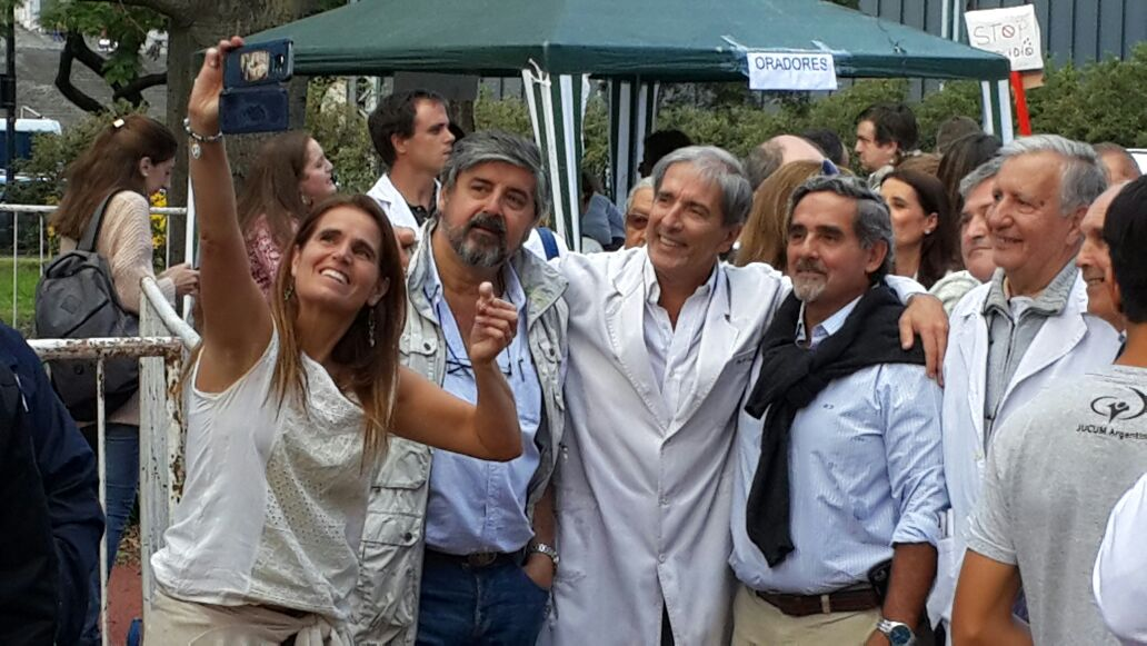 La activista provida (antiaborto) Mariana Rodríguez Varela junto a un grupo de médicos que participaron de la convocatoria Marcha por la Vida argentina 2018 repudiando el proyecto de aborto legal